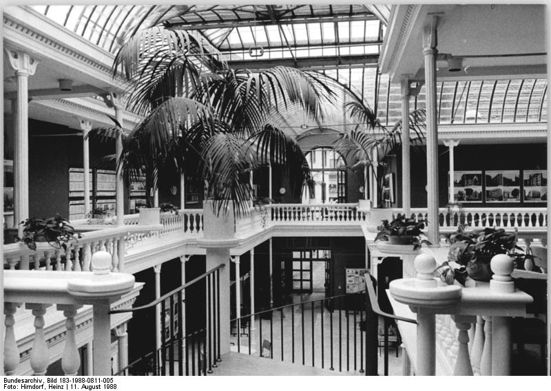 ADN-ZB Hirndorf 11.8.1988 Erfurt: Das Palmenhaus in Erfurt wurde vor kurzem nach viermonatiger gründlicher Rekonstruktion den Bauleuten des WBK als "Haus der Baukunst" übergeben. Das 100 Jahre alte Denkmal der Glashausarchitektur des 19. Jahrhunderts - vergleichbar mit den größeren Kristallpalästen in London und Paris - diente einst als Bukettbinderei und Blumenverkaufsraum der namhaften Gärtnerei I.C. Schmidt. Heute dient das attraktive Gebäude den Bauschaffenden als Kommunikations- und Ausstellungszentrum. Für Interessenten gibt es ab und zu einen "Tag der offenen Tür".